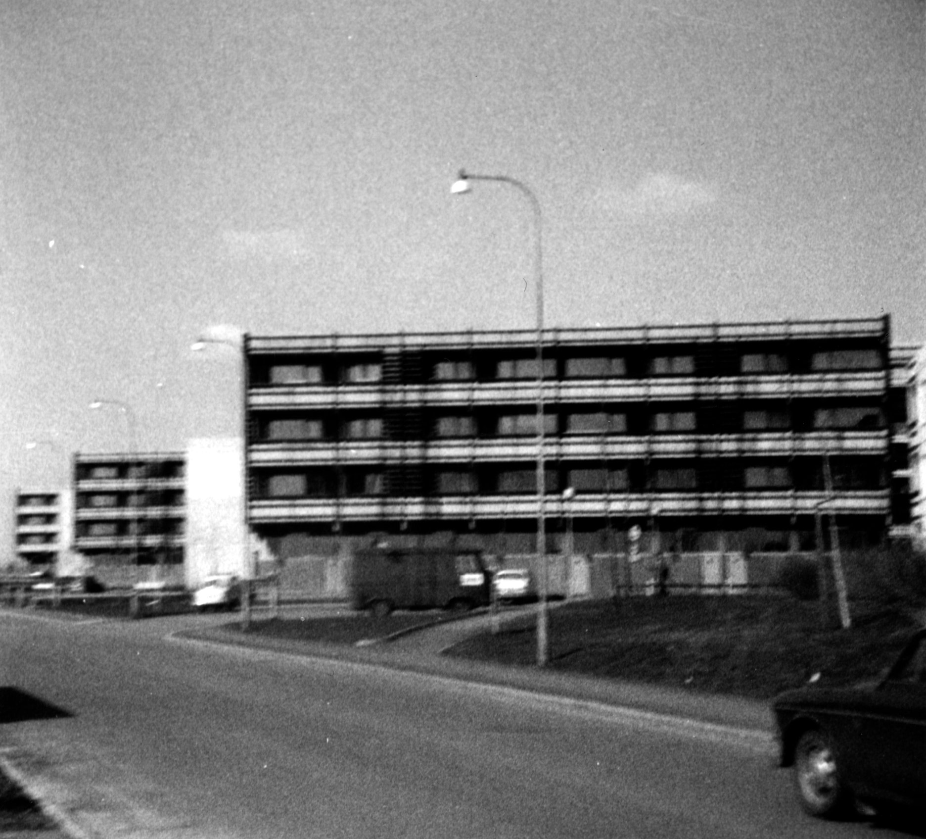 Rannebergen, ca 1982